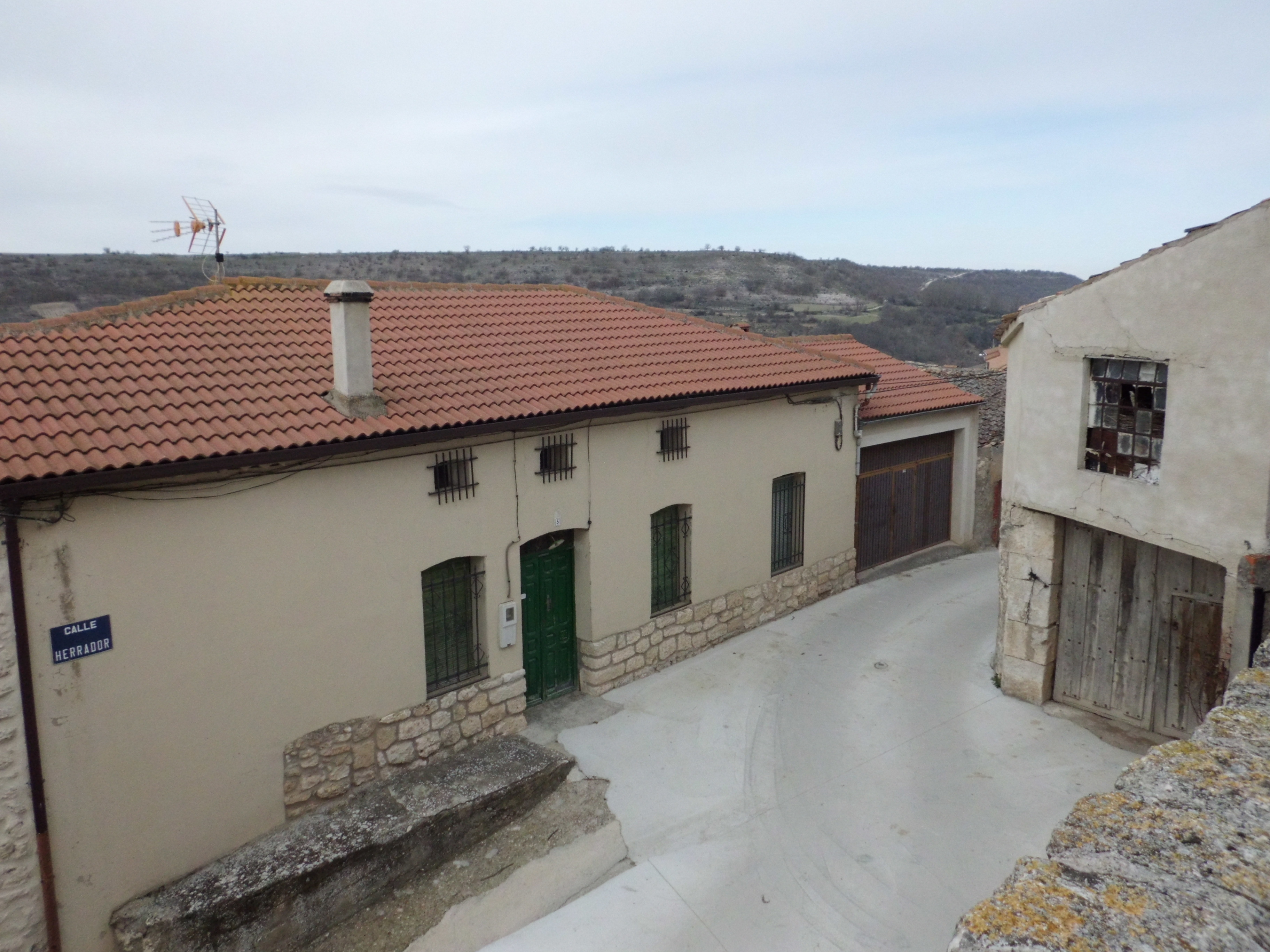 Localidad segoviana de Cuevas de Provanco en España. Una calle vista desde lo alto de la iglesia de la Invención de la Cruz..